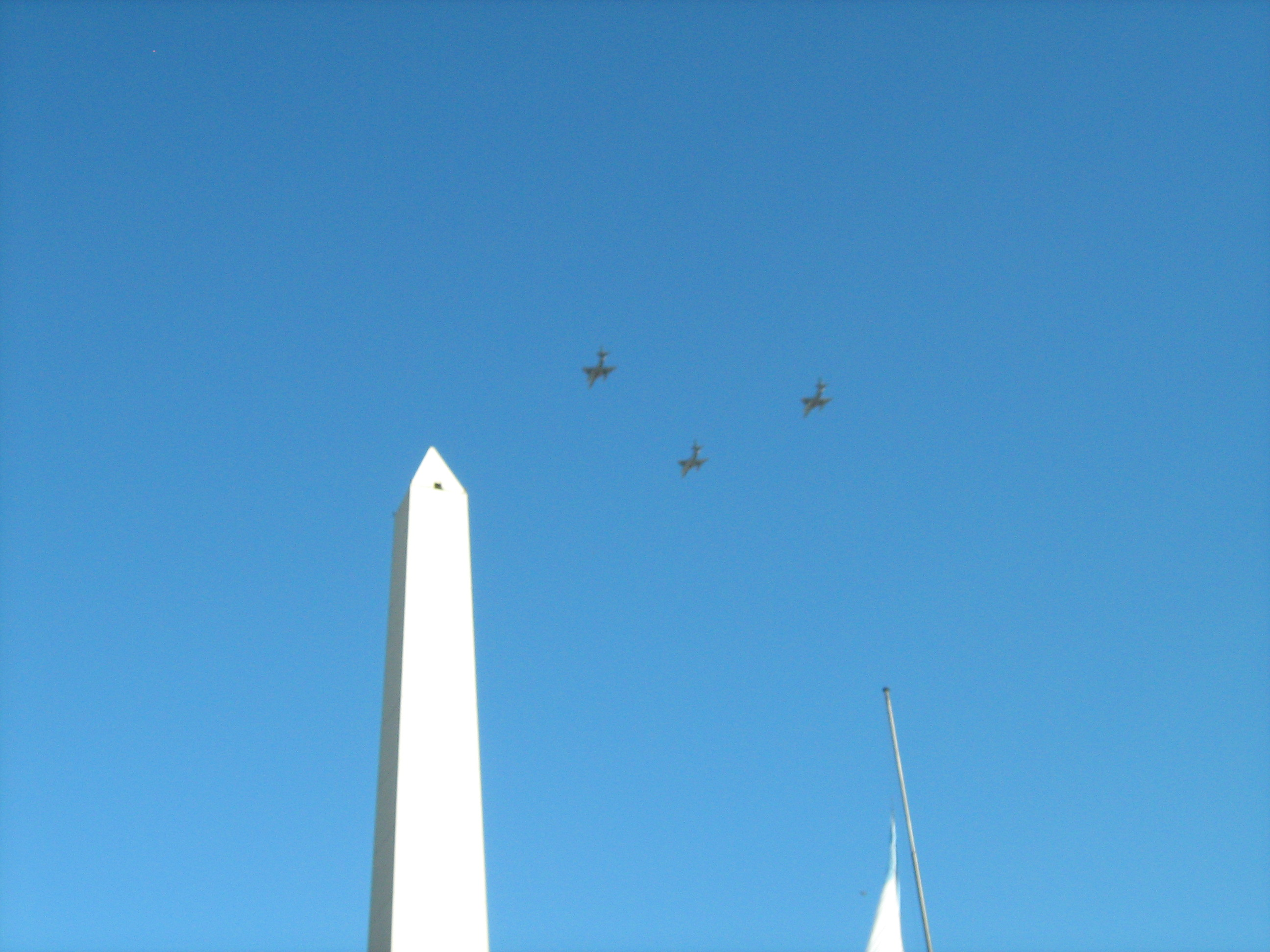 Pasaje de aviones A-4AR de la Fuerza Aérea Argentina sobre la avenida 9 de Julio en Buenos Aires, en el marco de los festejos por el Bicentenario Argentino, a la altura del Obelisco.